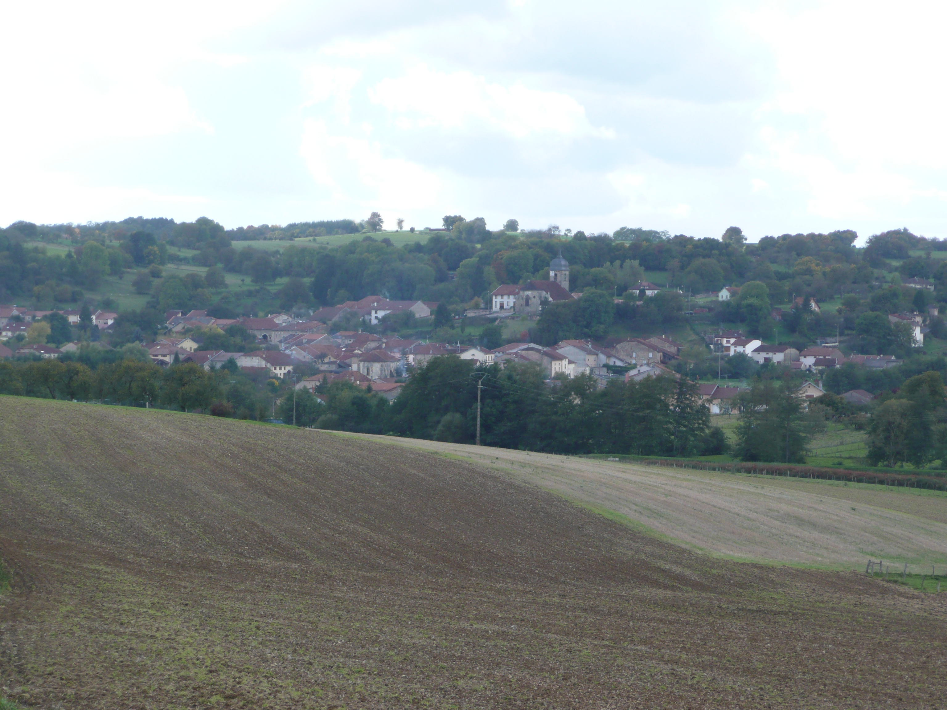 Bleurville vue du Nord-Est